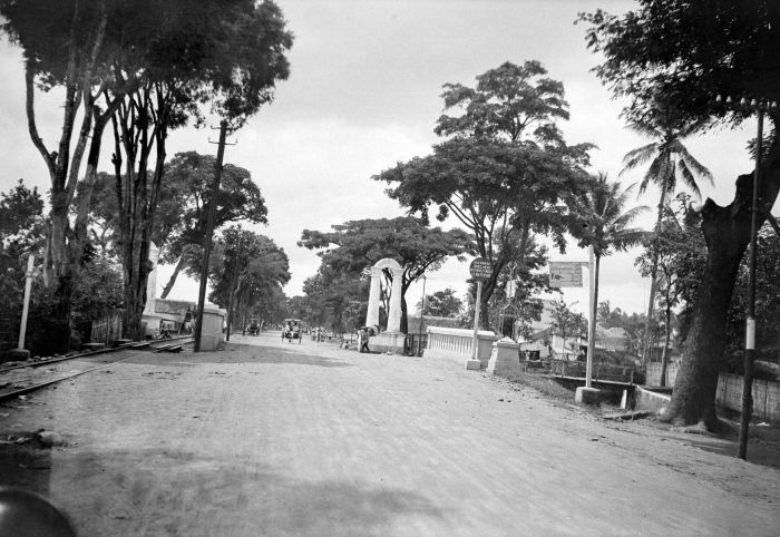 Repronegatief. Hoofdweg Malang-Lawang op de grens met Malang, residentie Pasoeroean, Oost-Java